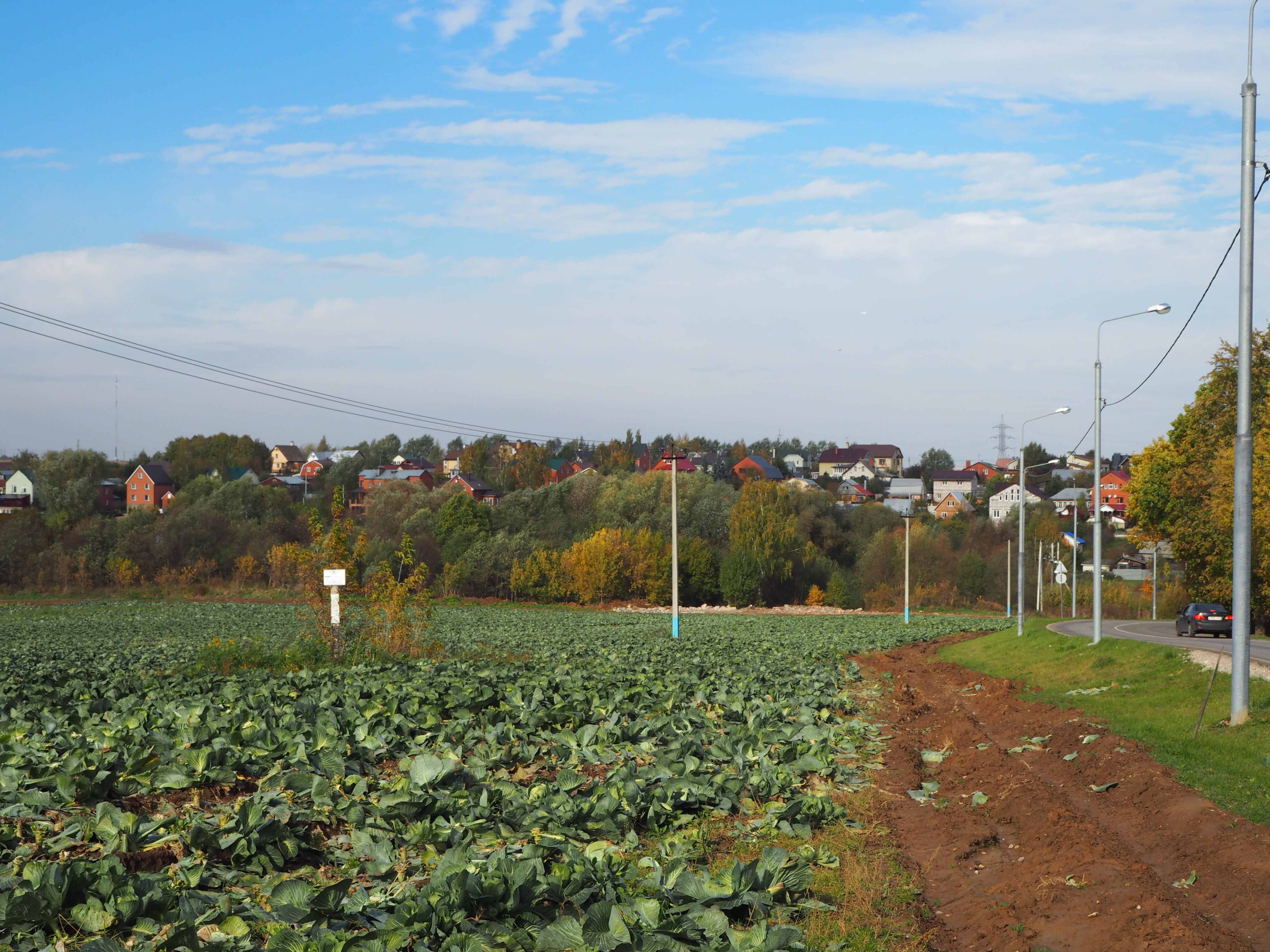 Капустное поле и деревня Армазово.